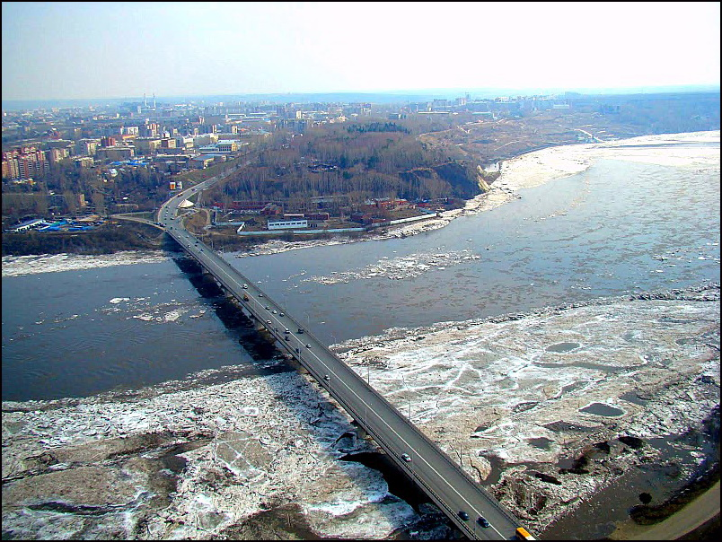 Briddge over Tom River Siberia Russia, April 29, 2010